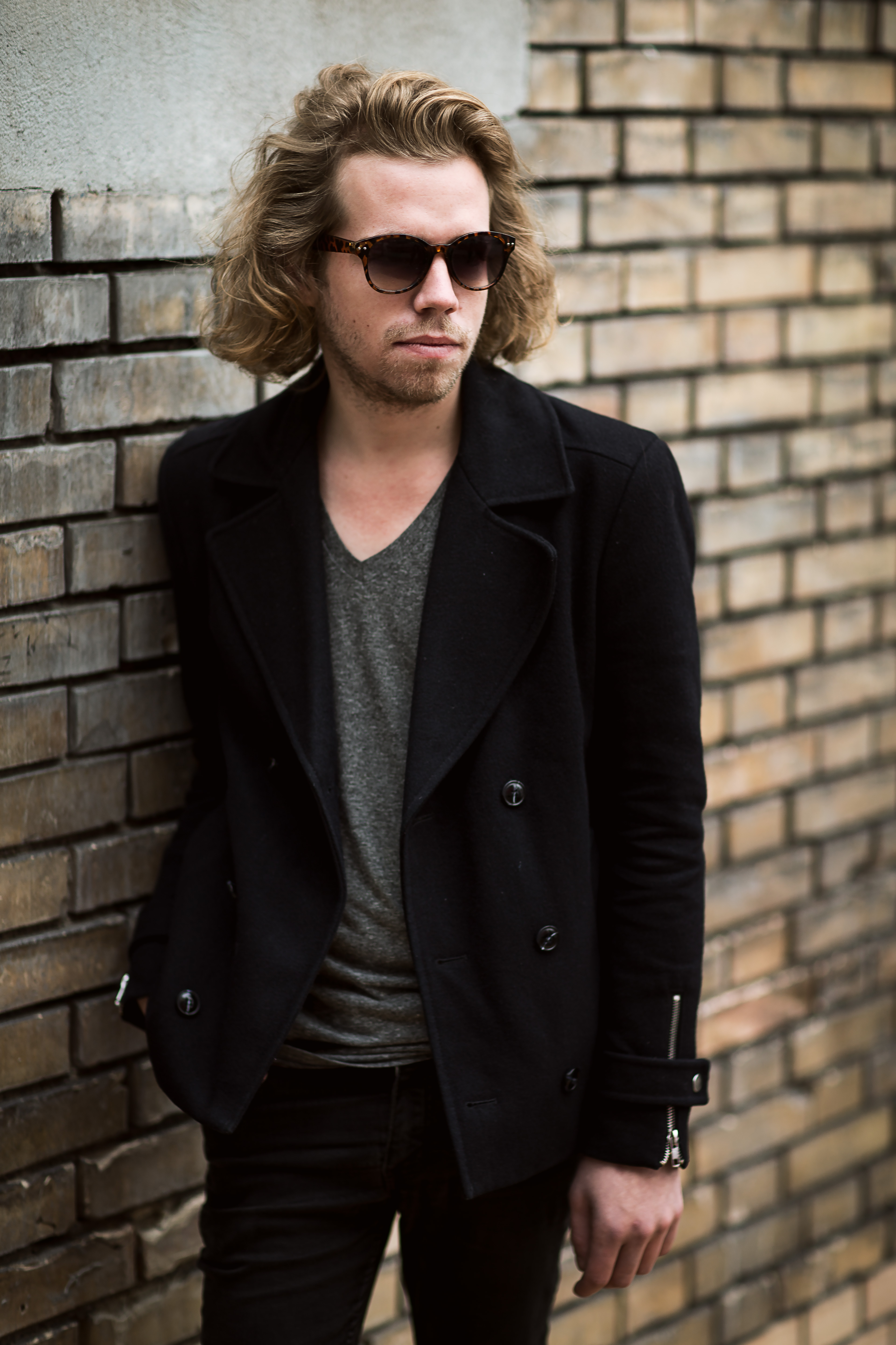 Stefan Brønner (Schlagzeug)